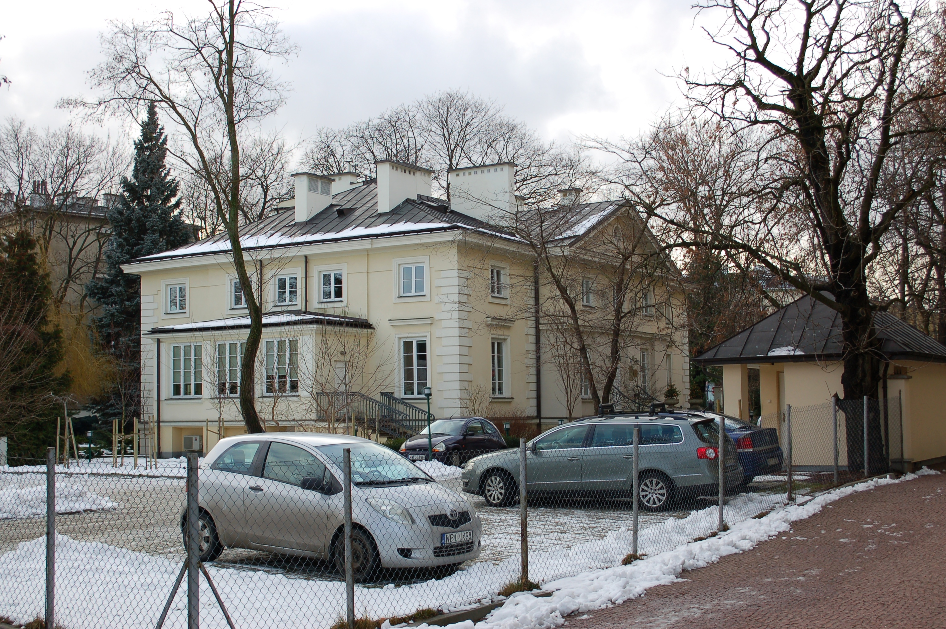 Henryk-Palast, Warschau